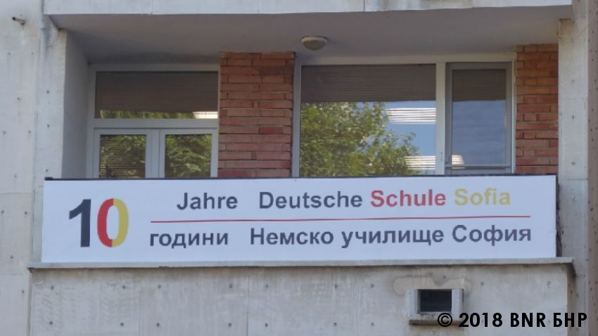 Zum Jubiläum der Deutschen Schule in Sofia